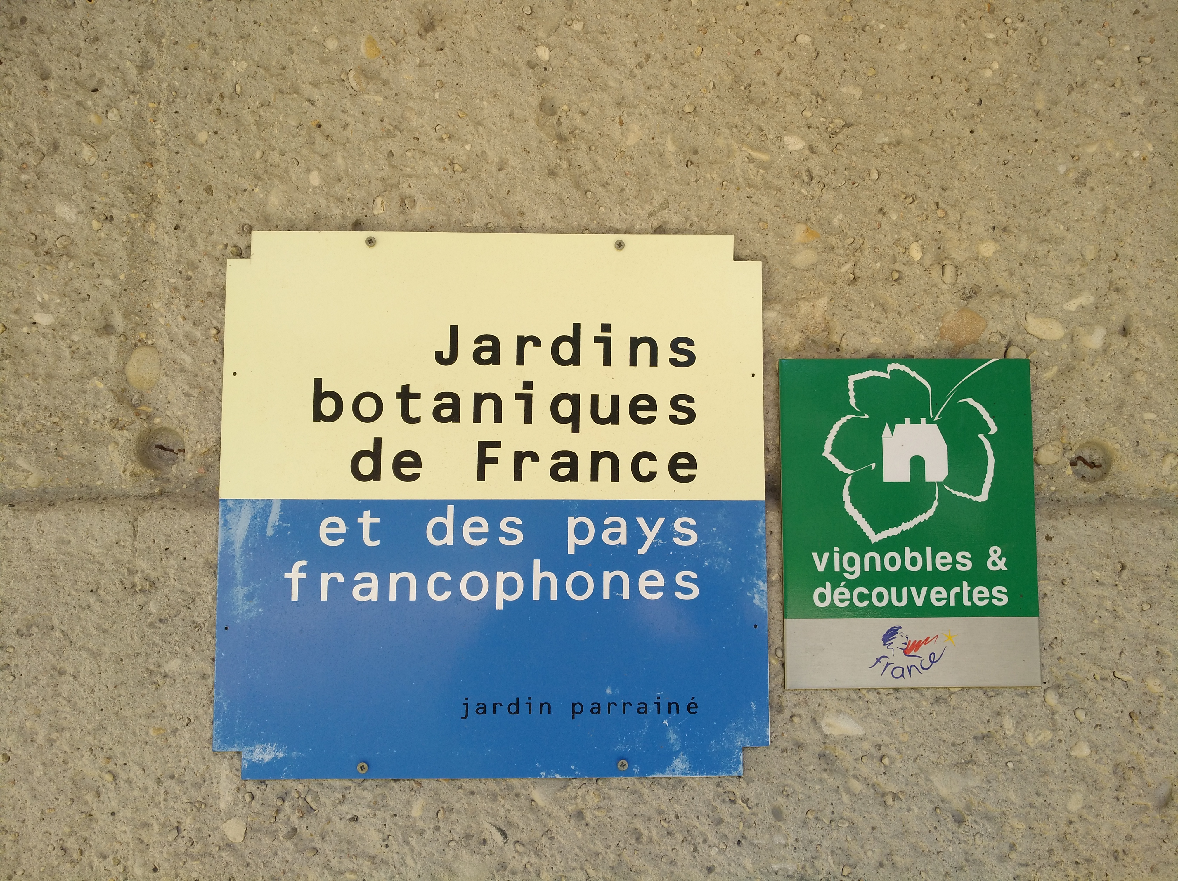 Plaque des Jardins botaniques de France et des pays francophones, à l'Espace Pierres Folles, à Saint-Jean-des-Vignes (Rhône, France).